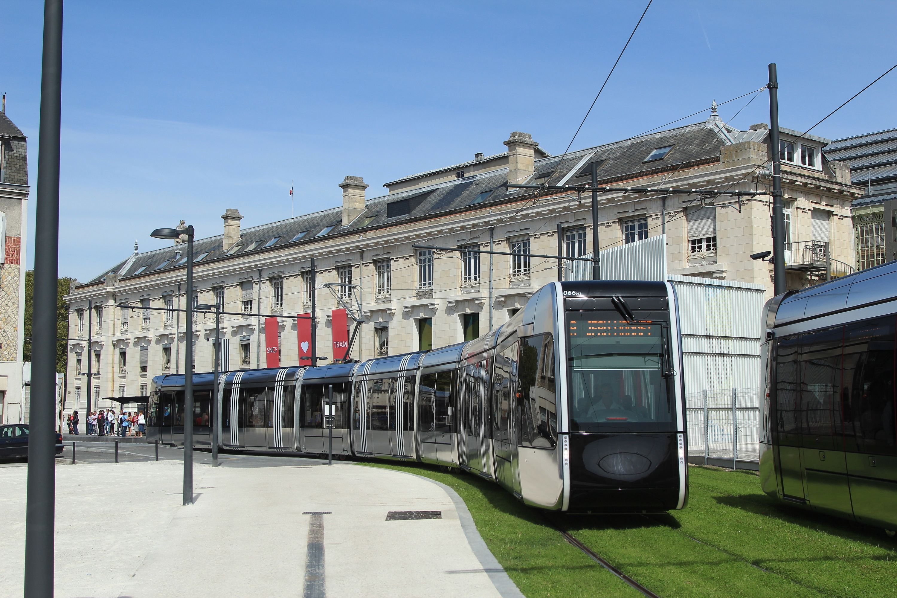 Deux tramways de Tours se croisent à la gare.